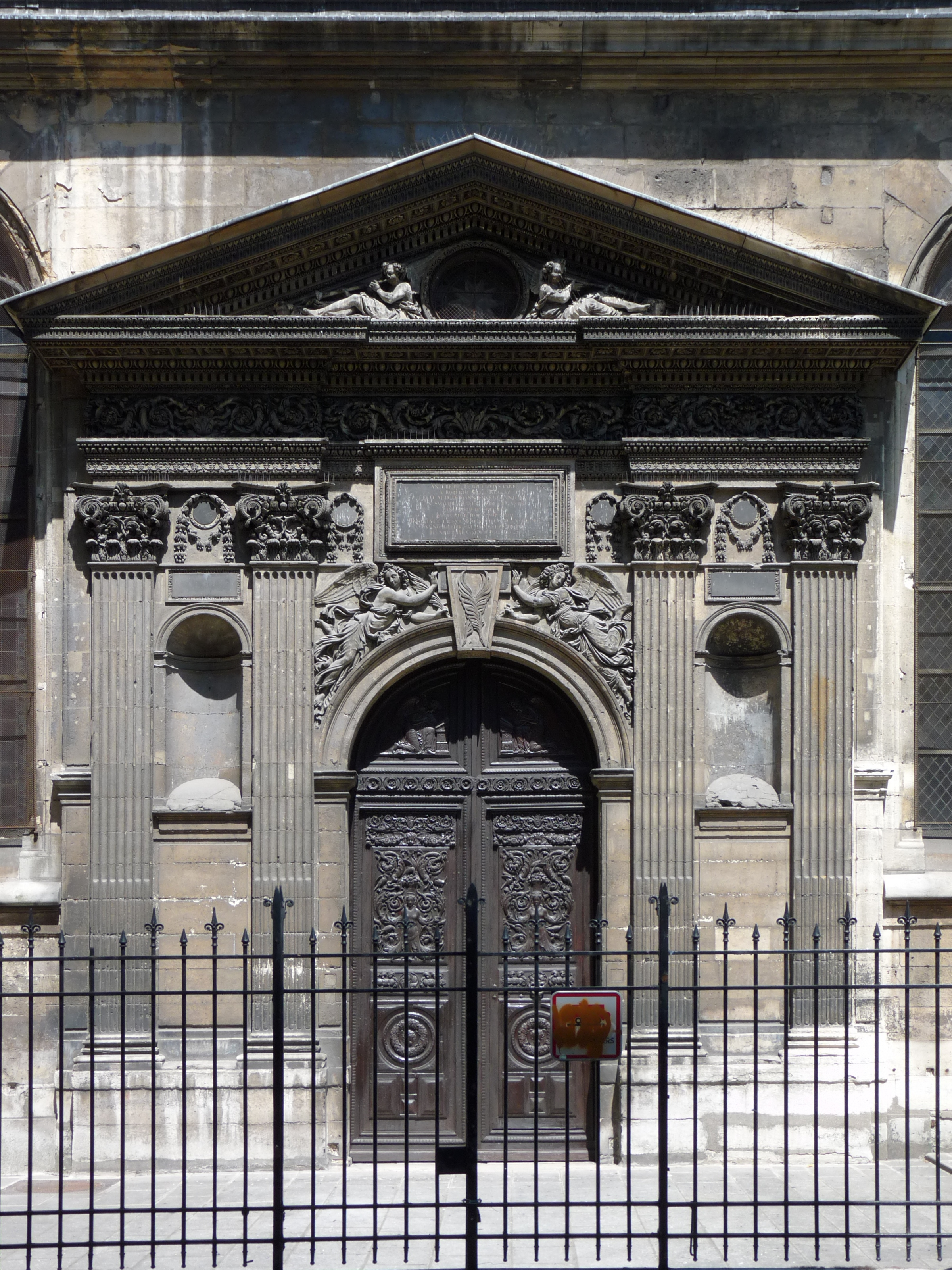 Portail sur le mur sud de l'église Saint-Nicolas-des-Champs à Paris, copie d'un portail de l'hôtel des Tournelles.